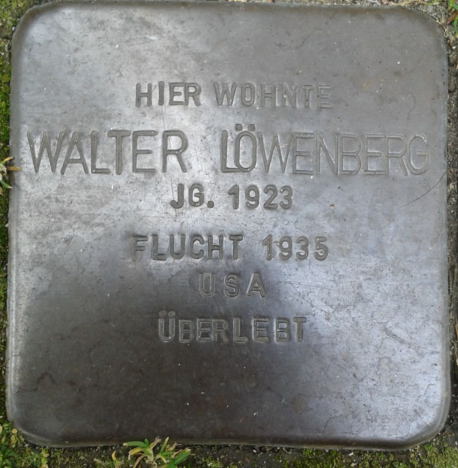 Stolperstein Datteln Münsterstraße 13 Walter Löwenberg